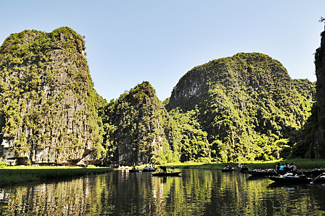 Núi đá và rừng đặc dụng Hoa Lư ở Quần thể danh thắng Tràng An tỉnh Ninh Bình